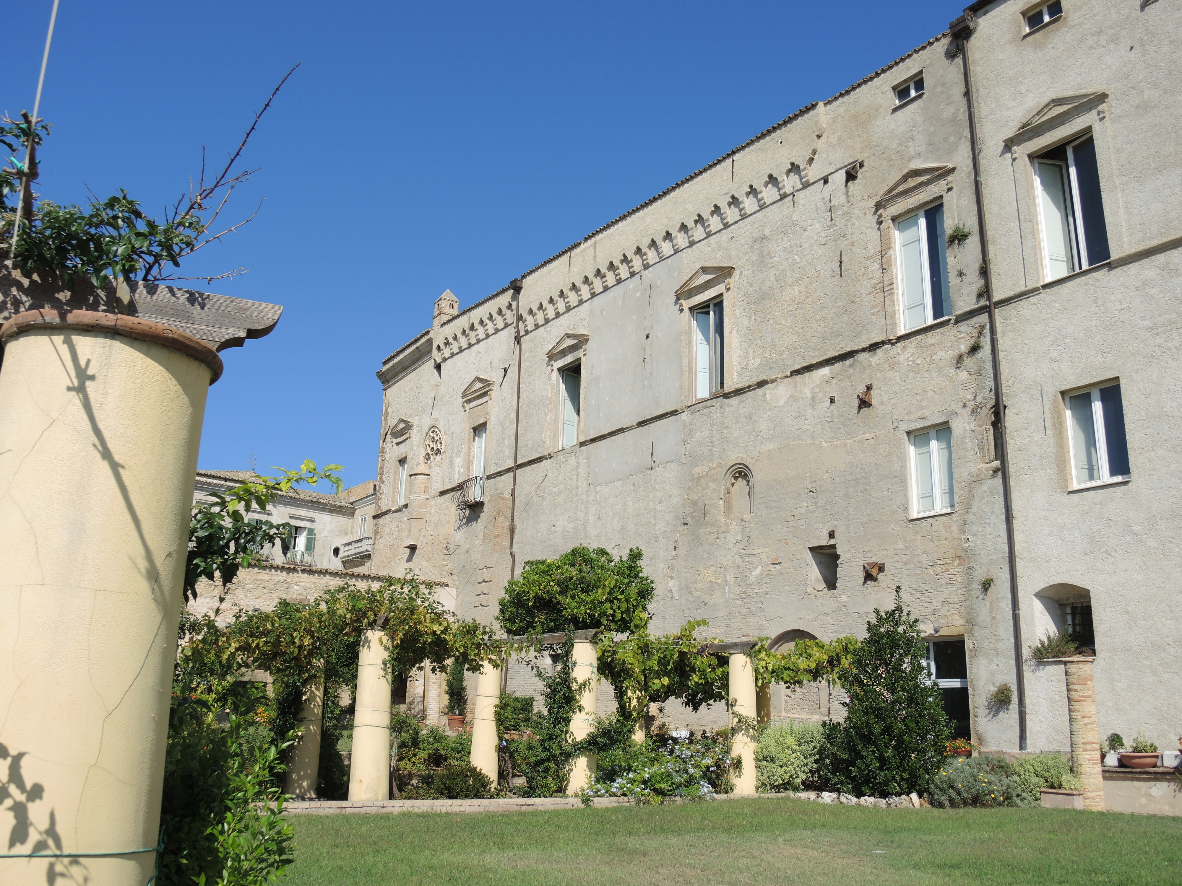 Palazzo d'Avalos This is a photo of a monument which is part of cultural heritage of Italy.